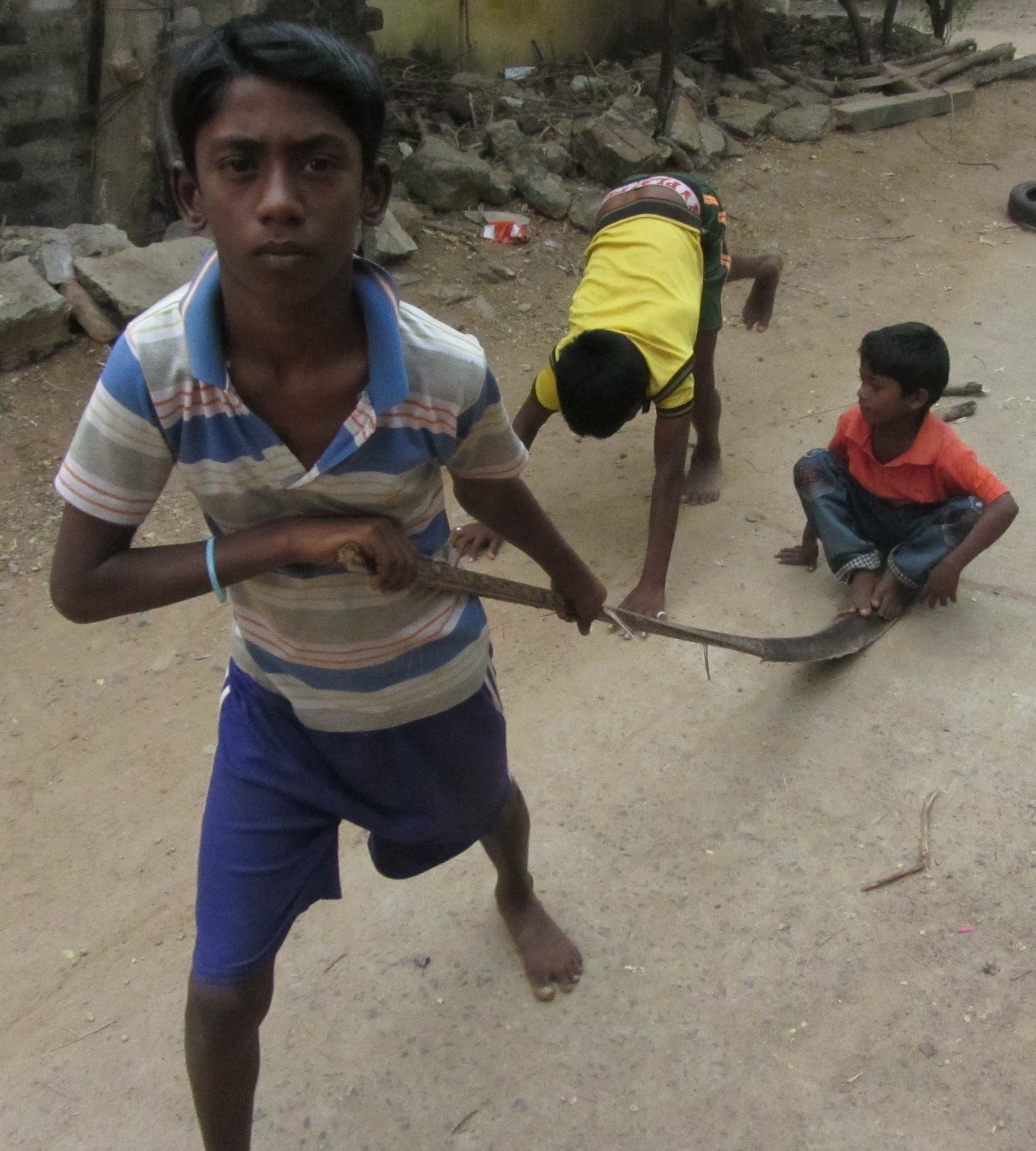 வண்டி இழுத்தல். தென்னைமட்டை வண்டி. இழுக்கக்கூடிய பொருள்களில் மற்றொருவரை அமரச்செய்து இழுத்தும் ஊர்ந்தும் மகிழ்வர்.